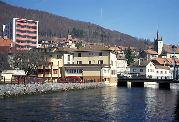 Vallorbe, im Vordergrund die Orbe